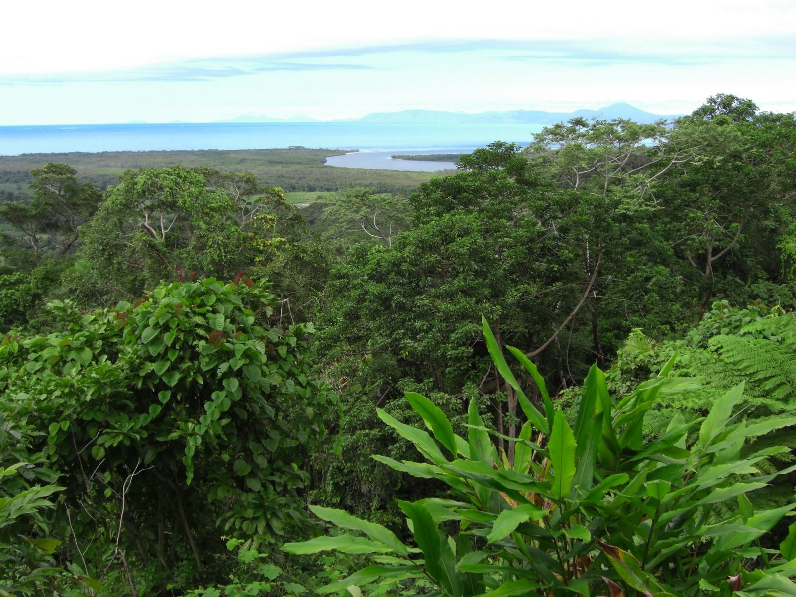 Vue de la canopée de la forêt Daintree